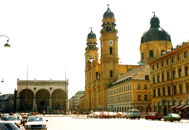 Odeonsplatz (Theatinerkirche, Feldherrnhalle) in Munich (Bavaria)